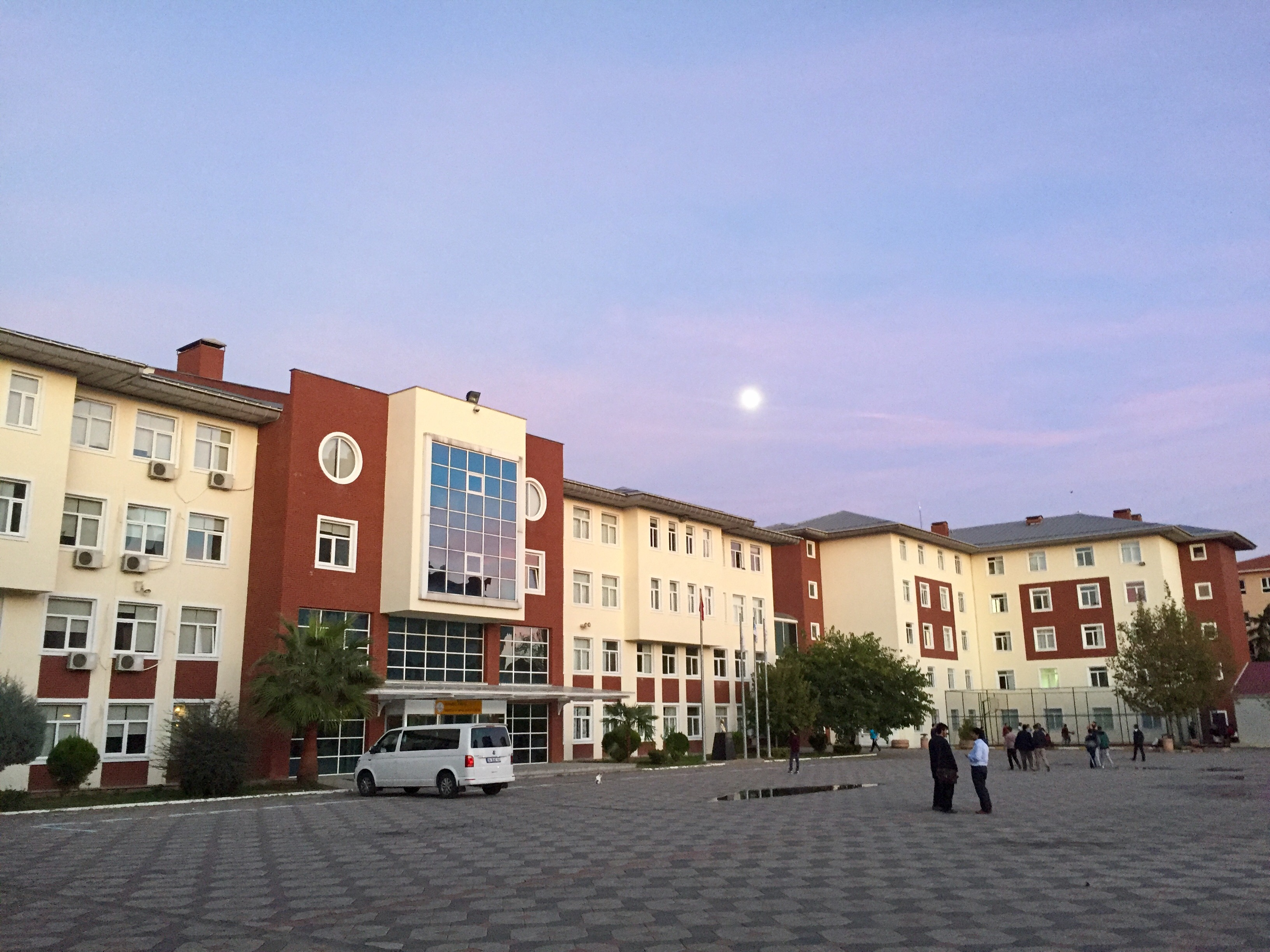 Kartal Anadolu İmam Hatip Lisesi A Blok ve Erkek Pasiyonu